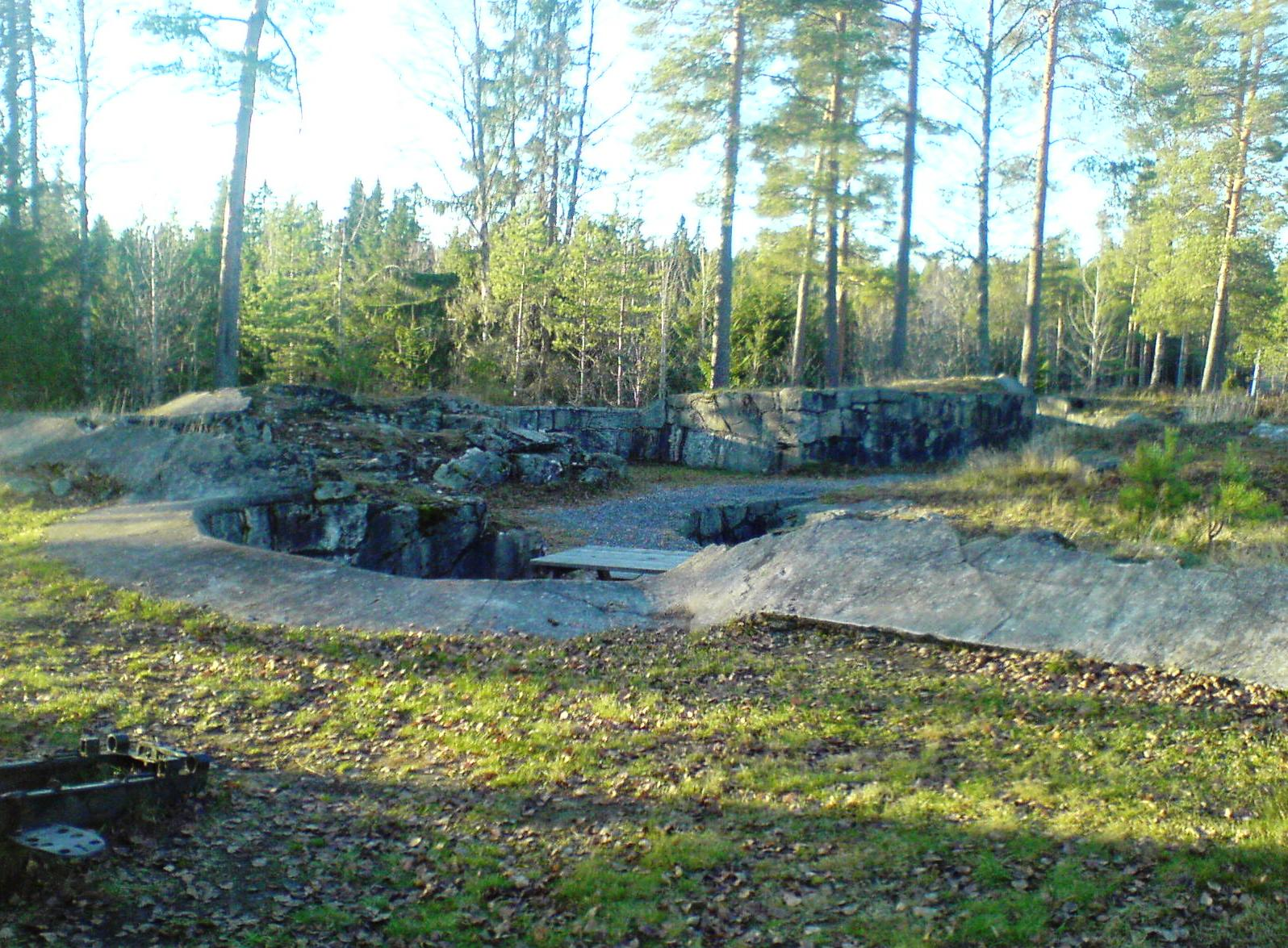 Urskog_fort_på_Lierfoss.